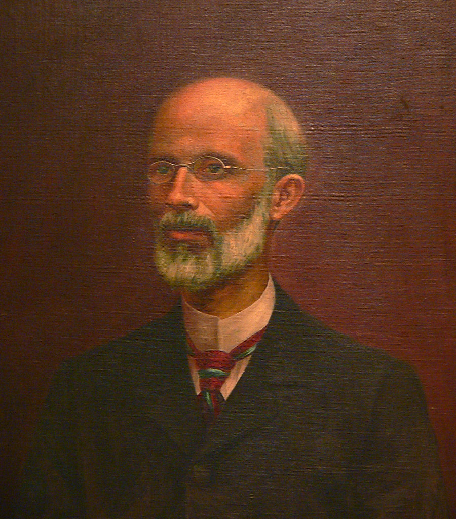 Joaquín María Arnau Miramón, Arquitecto, (1849 - 1906). Nació en Valencia (España) el 16 de marzo de 1849 y murió el 8 de septiembre de 1906. Calificado como el más importante arquitecto romántico valenciano. Retrato de autor desconocido que pertenece a la familia del arquitecto. La fotografia la he realizado yo mismo.